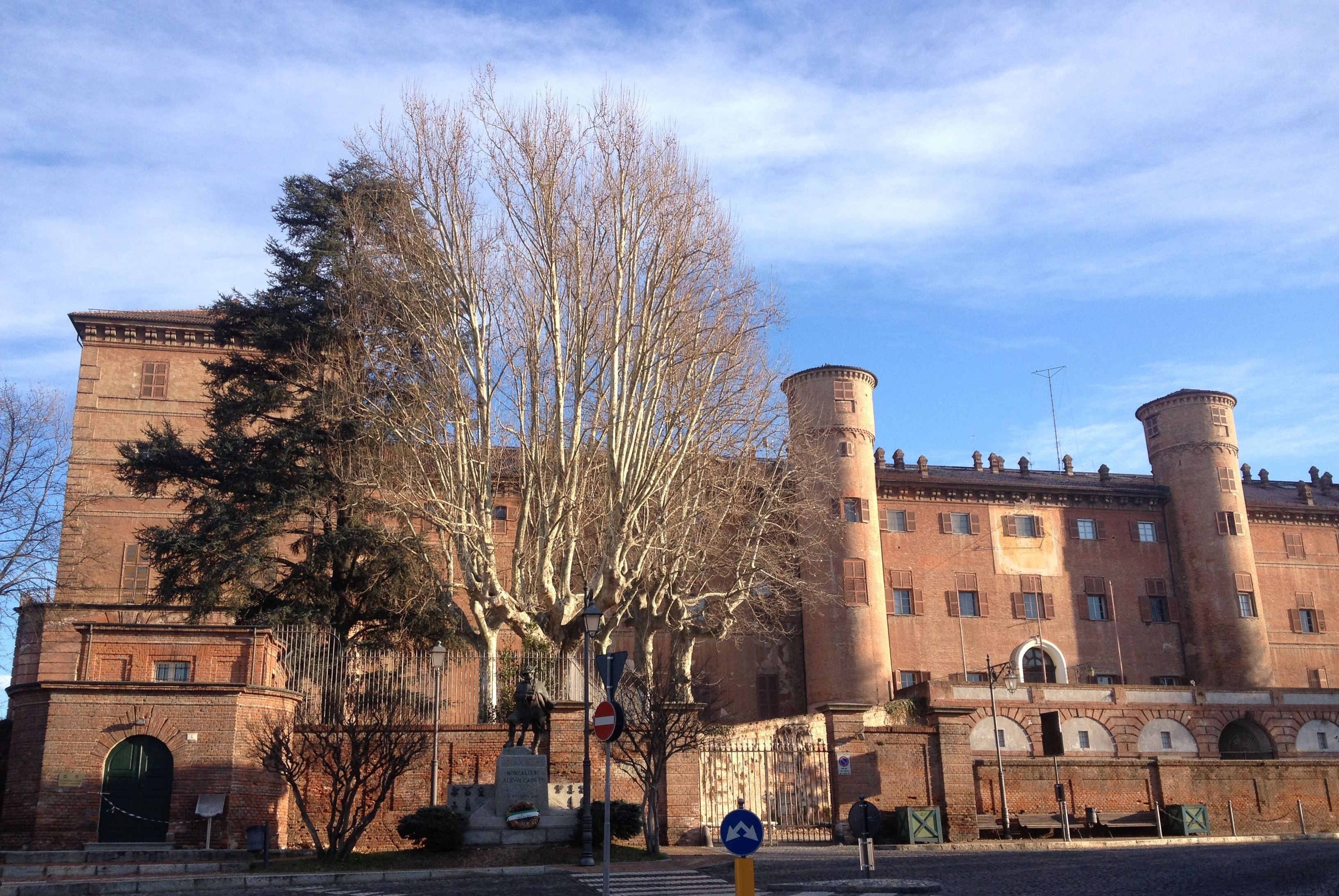 Castello reale di Moncalieri (TO)